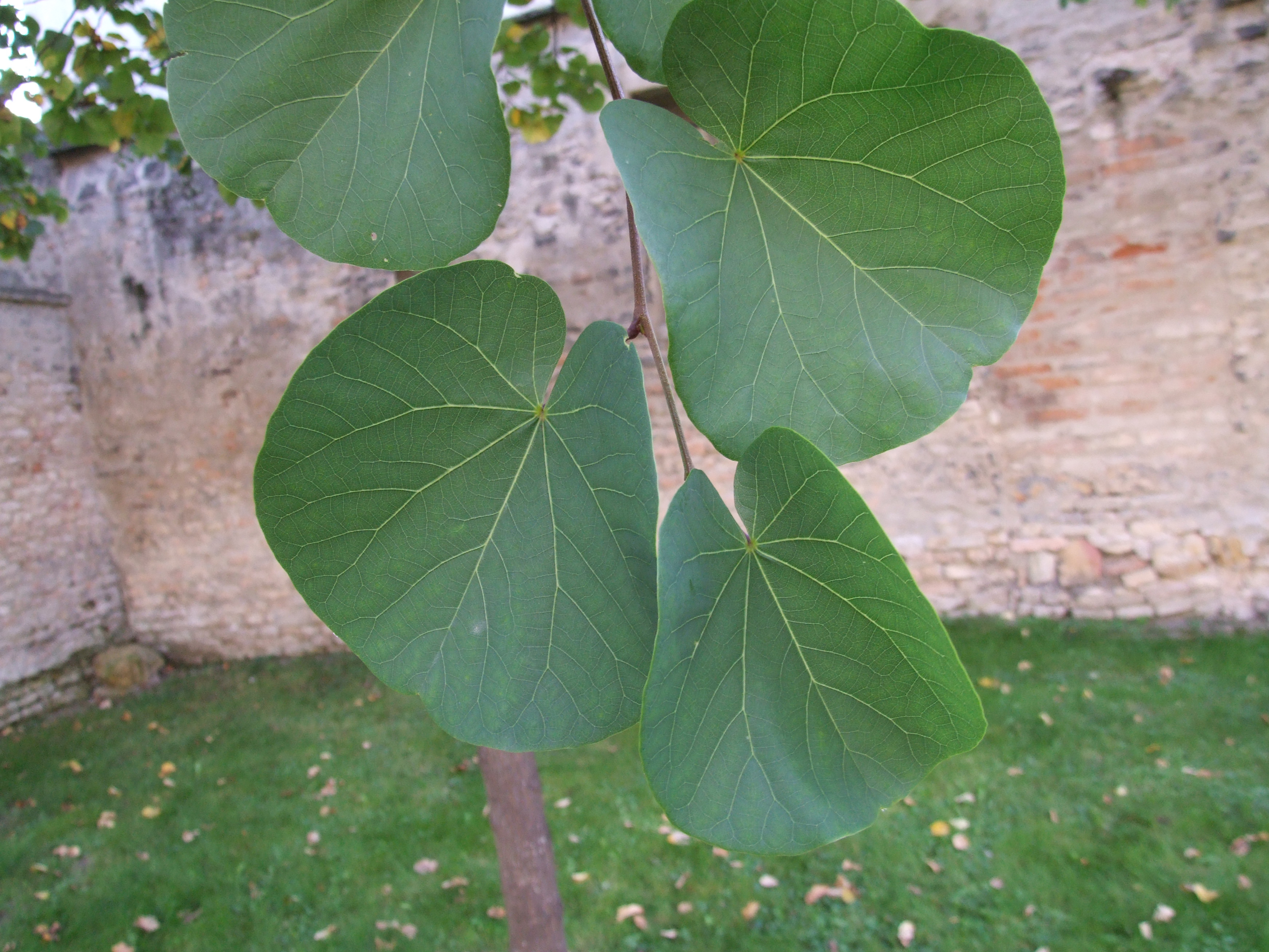 Blätter des Judasbaumes